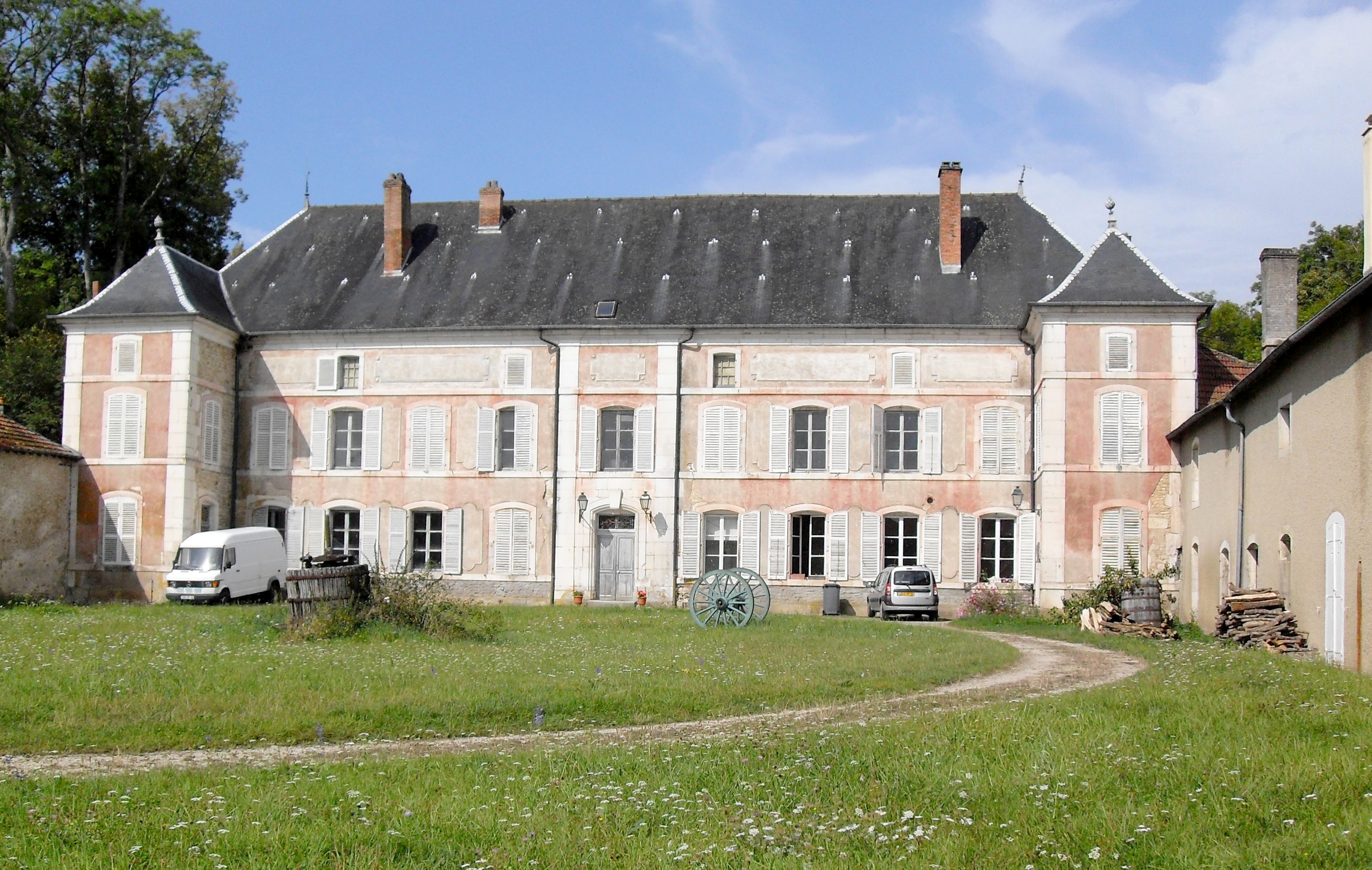 Château de Tusey, ancienne propriété de la Fonderie de Tusey, lieu-dit Tusy, Vaucouleurs, Département Meuse, France.